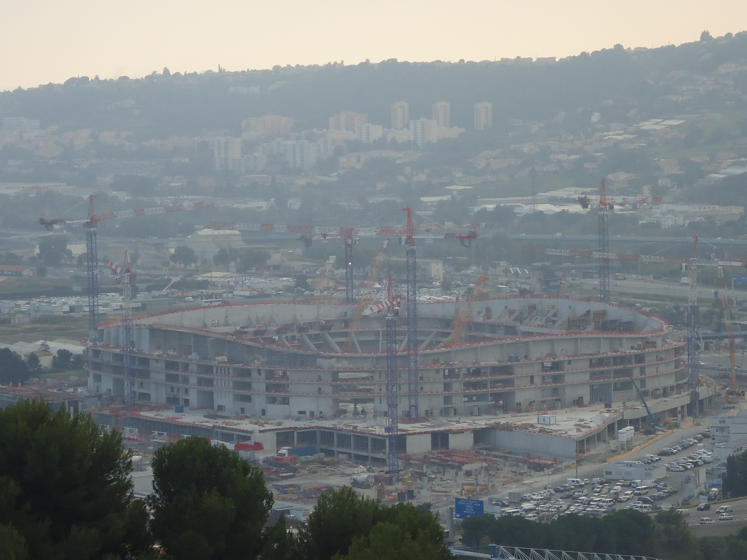 Chemin du créma